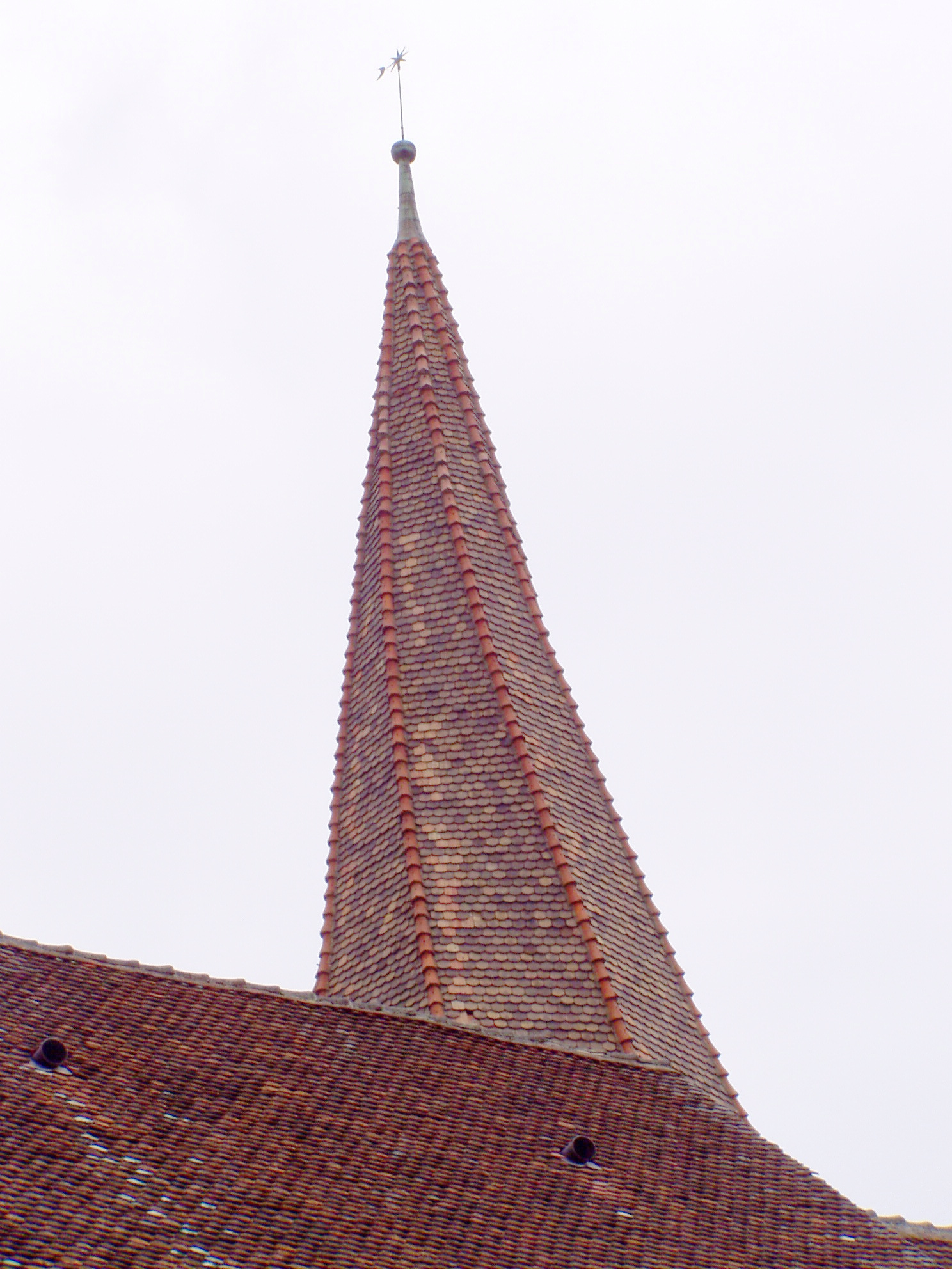 Photographie personnelle du clocher tors de l'église Saint Gall de Niedermorschwihr prise le 09 juillet 2006 par Accrochoc en rentrant de vacances.